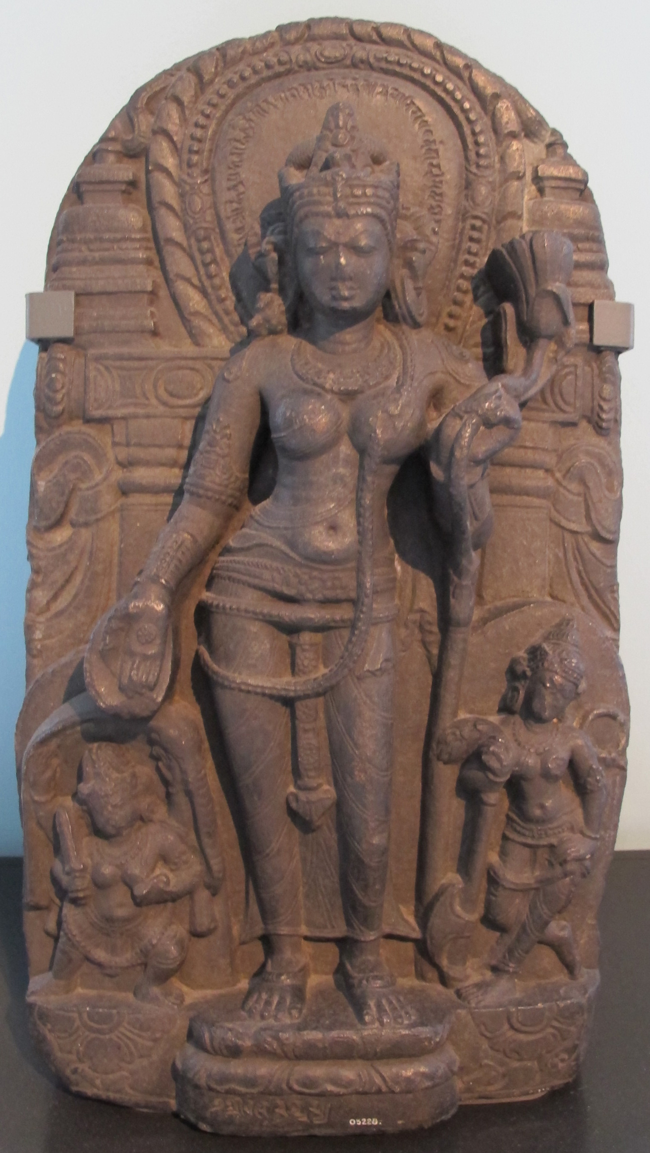 India, bihar, tara, 1100-1200